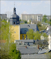 Blick auf Gefell im Saale-Orla-Kreis in Thüringen mit der Kirche „Unserer lieben Frauen“